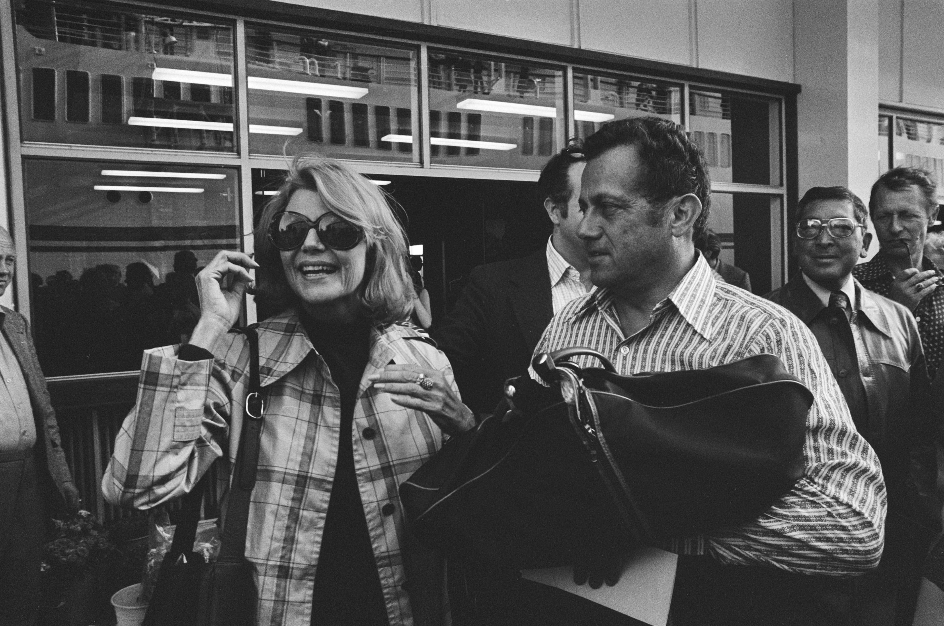 Collectie / Archief : Fotocollectie Anefo Reportage / Serie : [ onbekend ] Beschrijving : Actrice Rita Hayworth vertrekt met Grieks cruiseschip "Daphne" uit Amsterdam Datum : 12 juni 1976 Locatie : Amsterdam, Noord-Holland Trefwoorden : actrices Fotograaf : Mieremet, Rob / Anefo Auteursrechthebbende : Nationaal Archief Materiaalsoort : Negatief (zwart/wit) Nummer archiefinventaris : bekijk toegang 2.24.01.05 Bestanddeelnummer : 928-6399